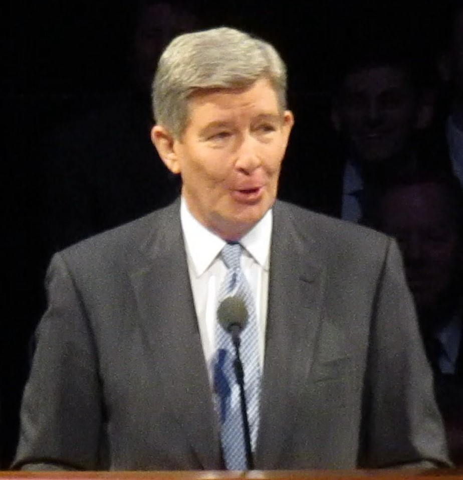 Elder S. Gifford Nielsen delivering a BYU devotional.